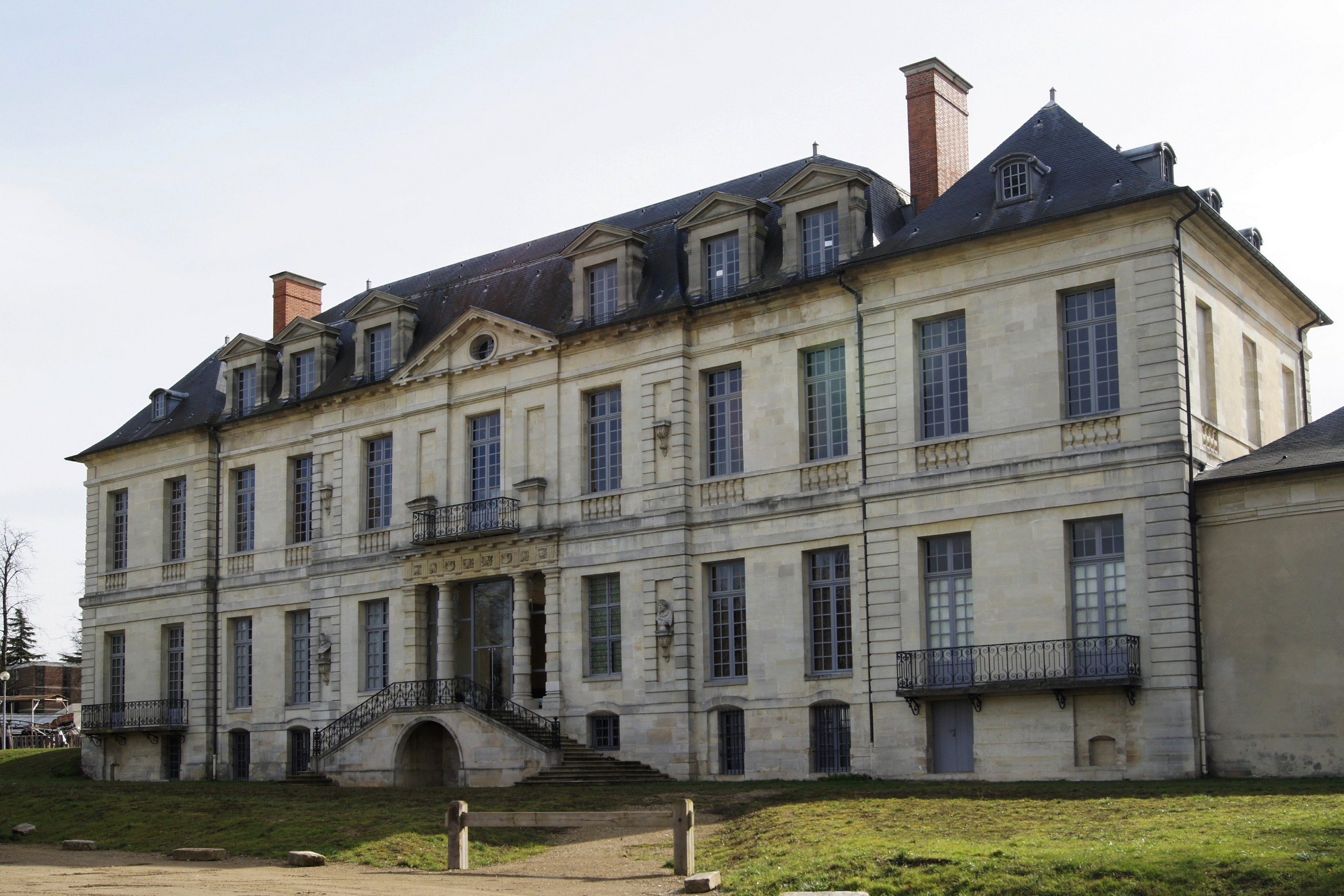 Le château de Sucy-en-Brie, vue de l'arrière